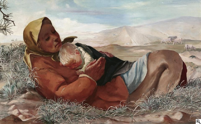 Fritz Burmann Mutter Erde Fischersfrau mit ihrem Kind in den Dünen der Kurischen Nehrung. Signiert und datiert unten links: Fritz Burmann 38. Tempera auf Karton. 76 x 121cm.